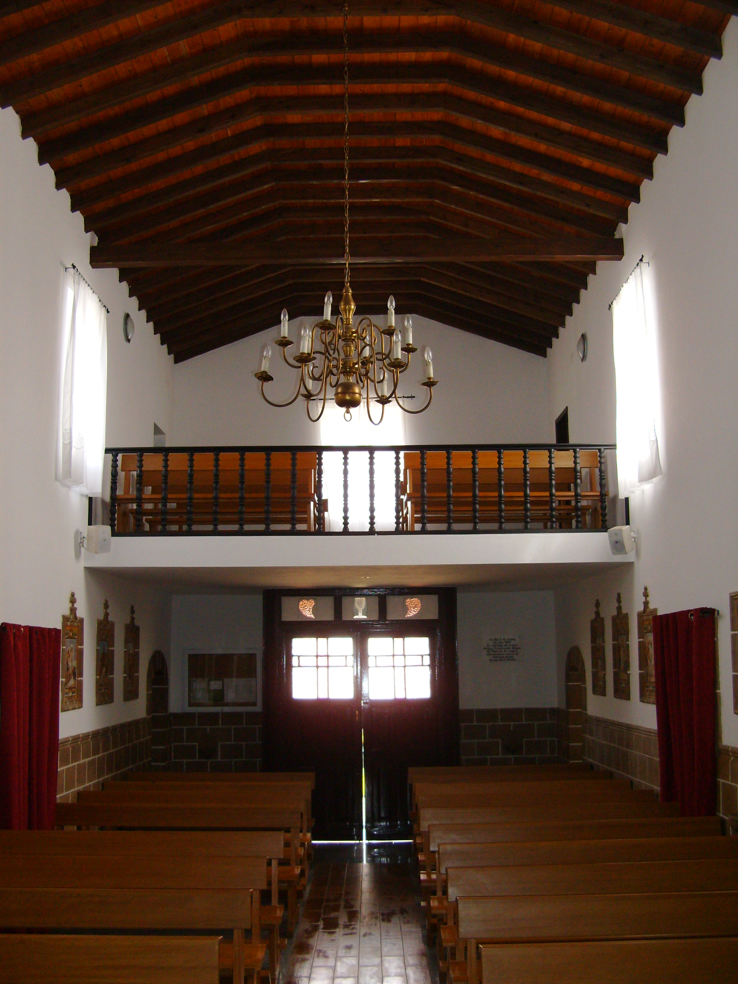 Igreja de São Pedro, Ilha de Santa Maria (Açores), Portugal.